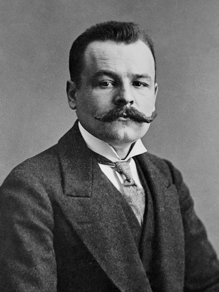 Депутат Государственной Думы 4-го созыва от Петербургской губернии А.Е.Бадаев.